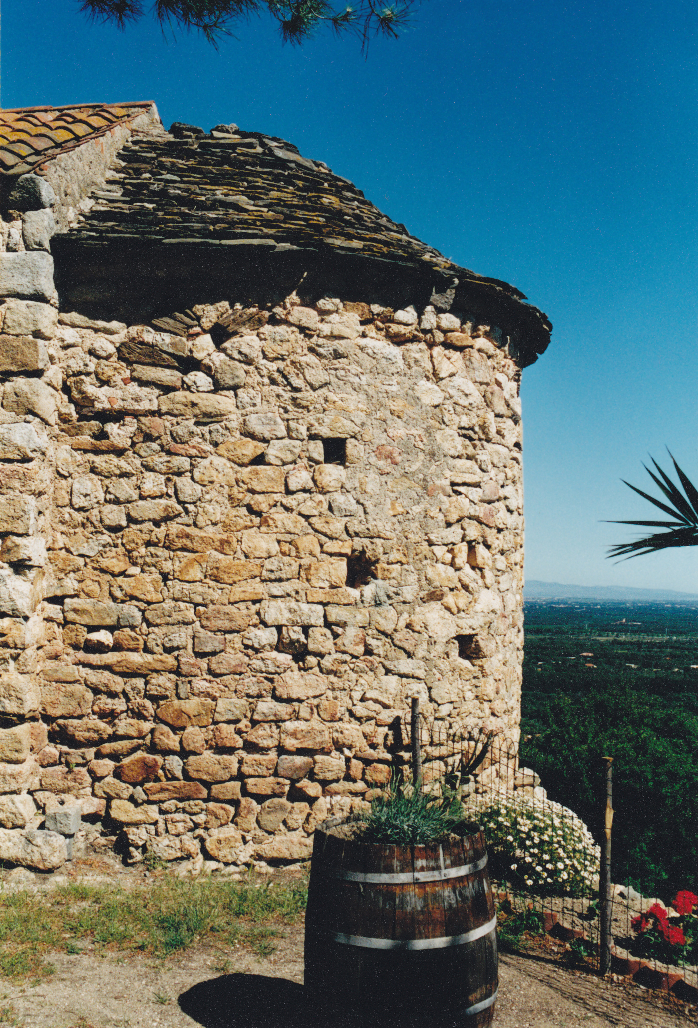 France - Roussillon - Saint-Jérôme d'Argelès (préroman) : le chevet